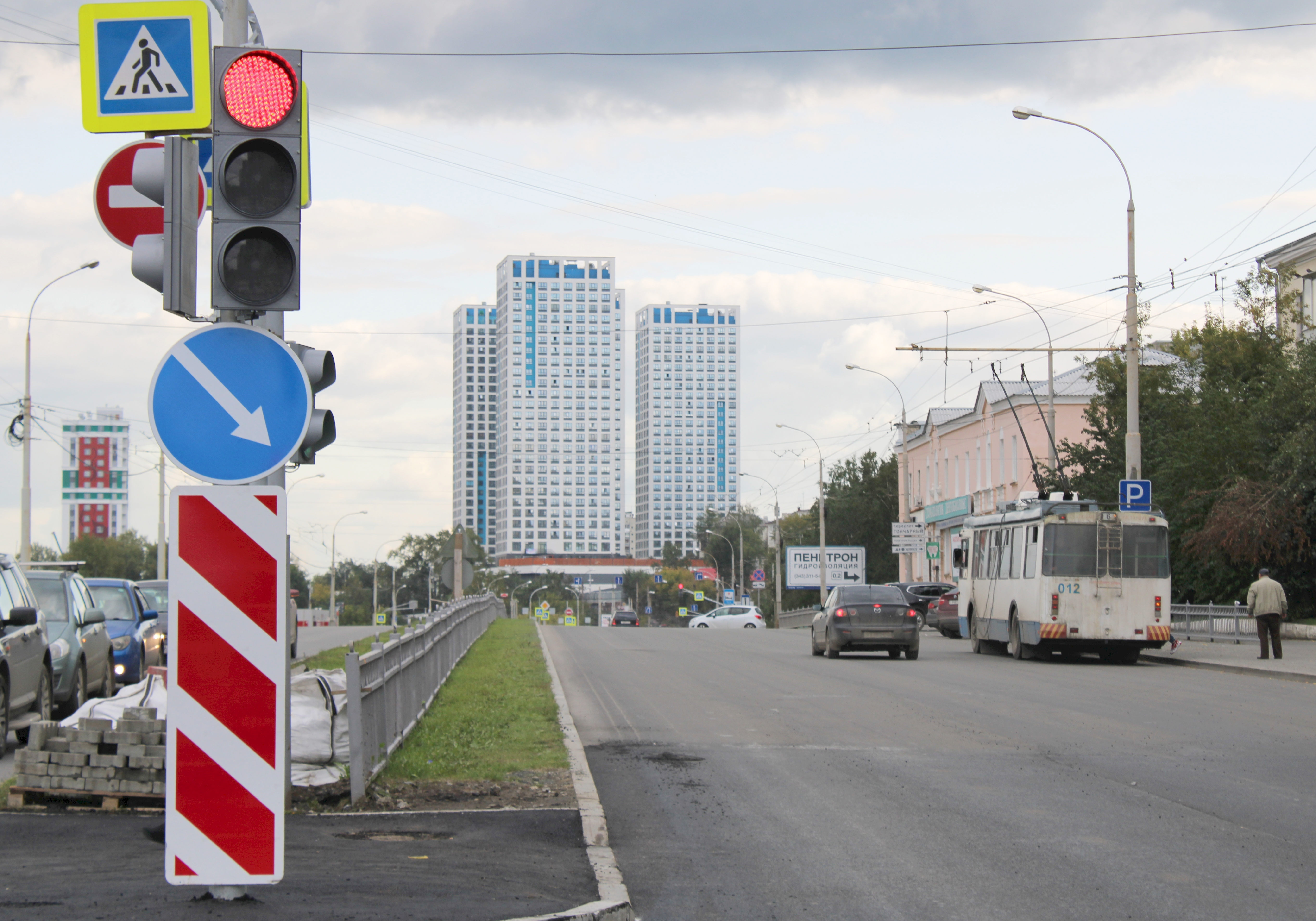 Улица Щербакова (Екатеринбург) от переулка Широкий в сторону Химмаша. Слева вдали — жилой комплекс «Сказы Бажова» (Щербакова, 74), справа вдали — корпуса 1—4 на Щербакова, 77